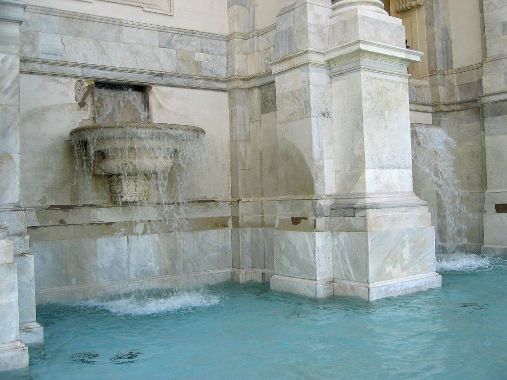 Fontana dell'Acqua Paola, Gianicolo, Roma. Picture by Torvindus.